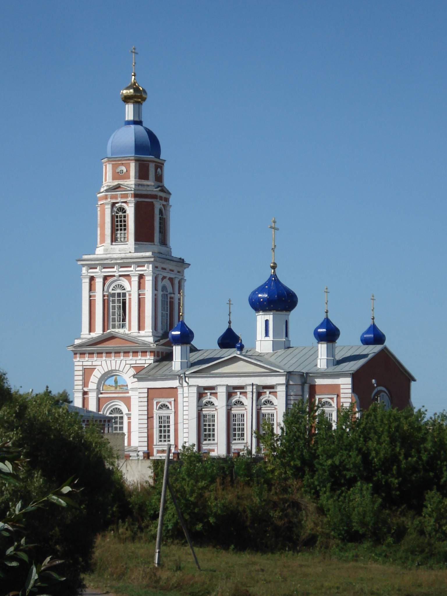 Pokrov Church Drakino Mordovia.